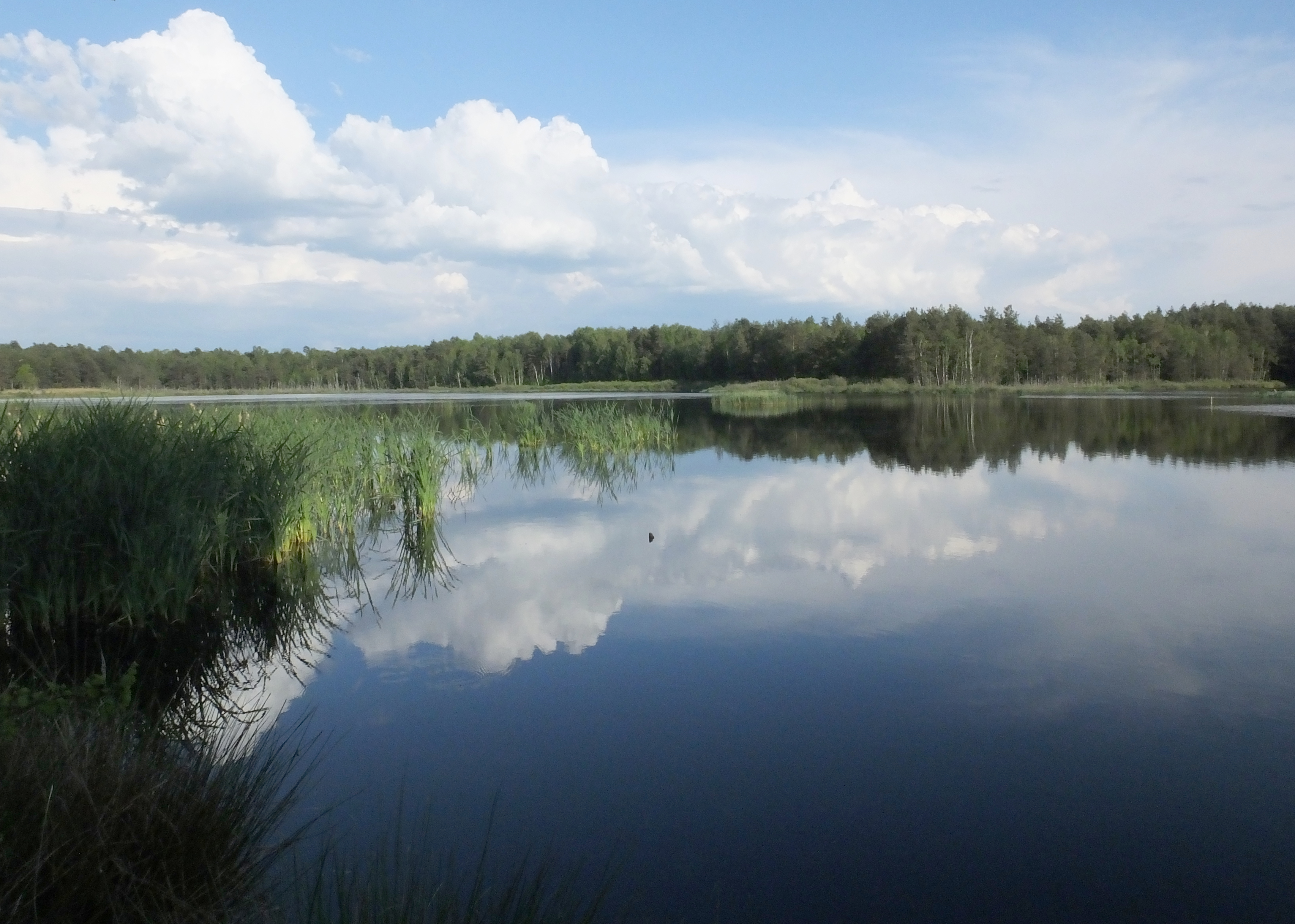 Staw Jagodny w Helenowie koło Zwolenia